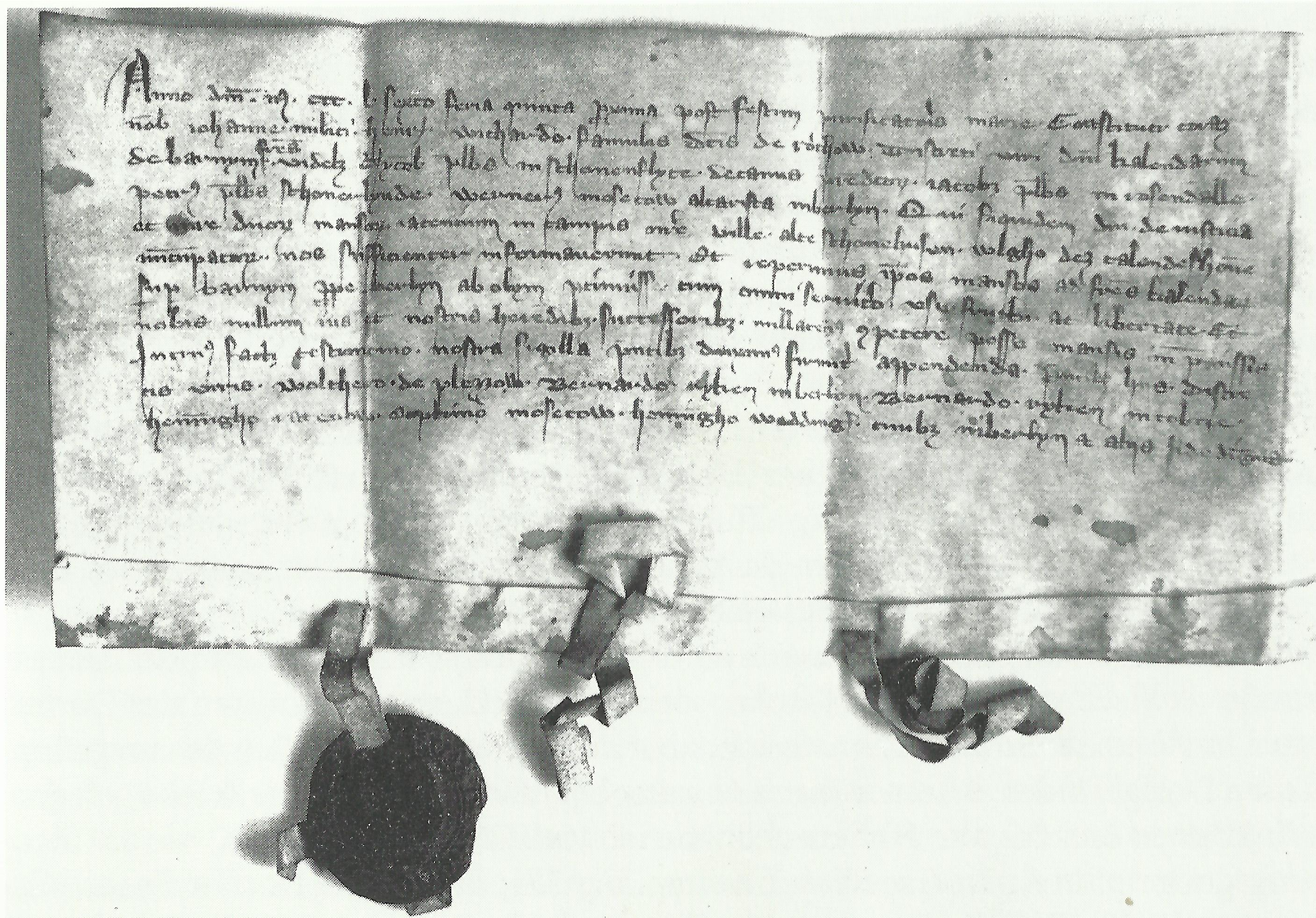 Erste Erwähnung des Dorfes Hohenschönhausen in einer Urkunde des Johann von Rochow für die Kalandsherren auf dem Barnim.